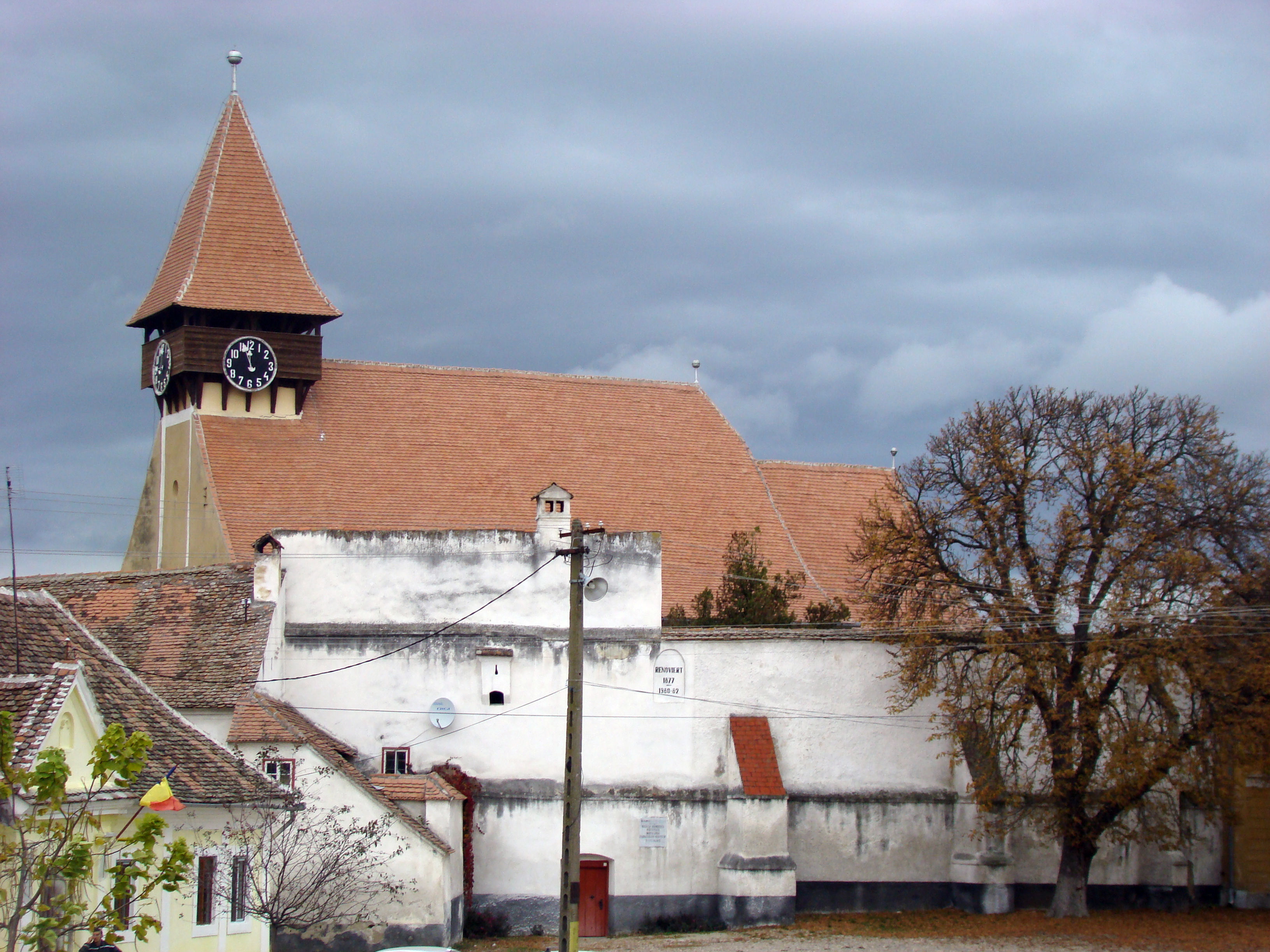 Saxon fortified church in Miercurea Sibiului (Reussmarkt), Sibiu county, Romania